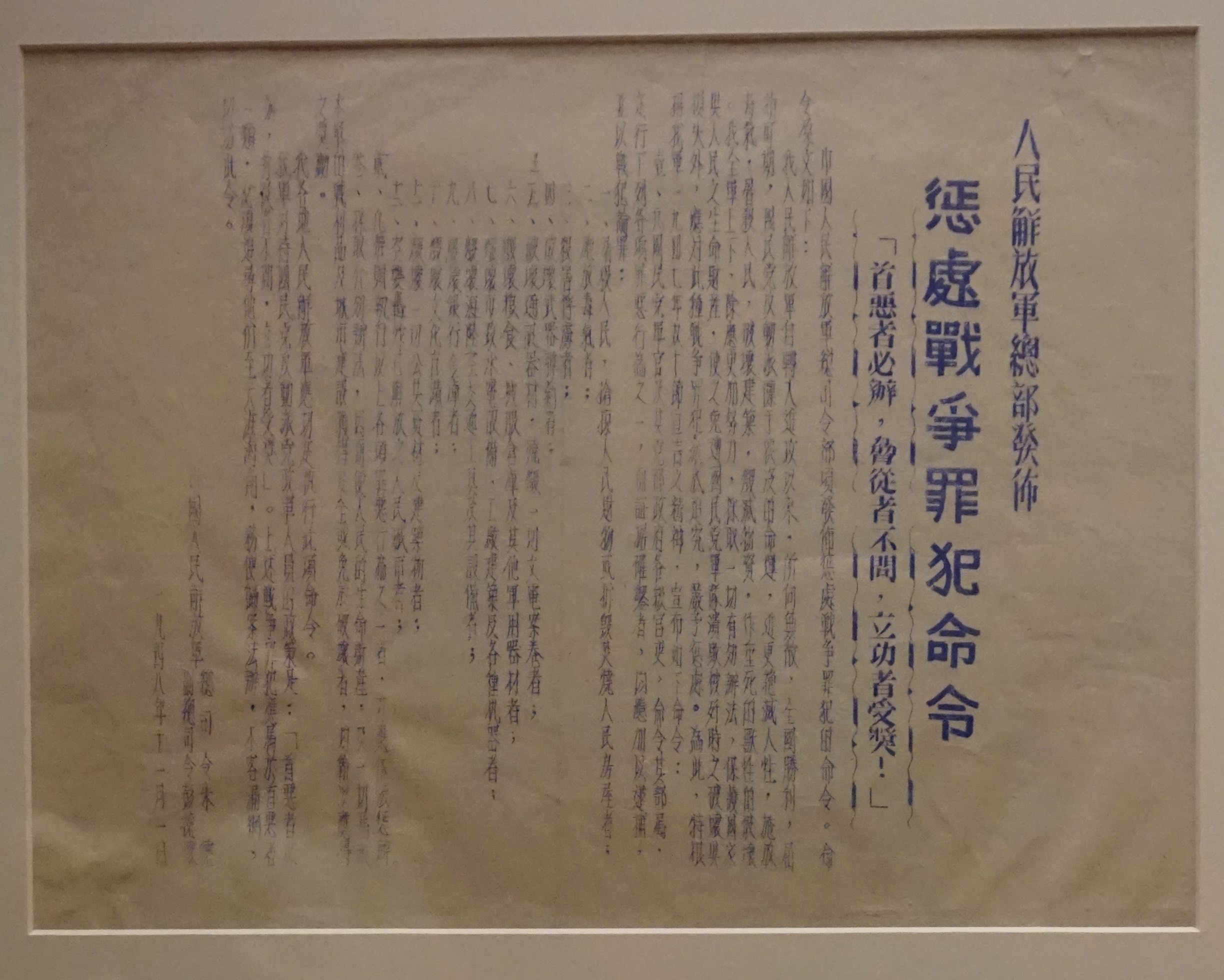 中文（中国大陆）: 1948年11月中国人民解放军总部发布的《惩处战争罪犯命令》